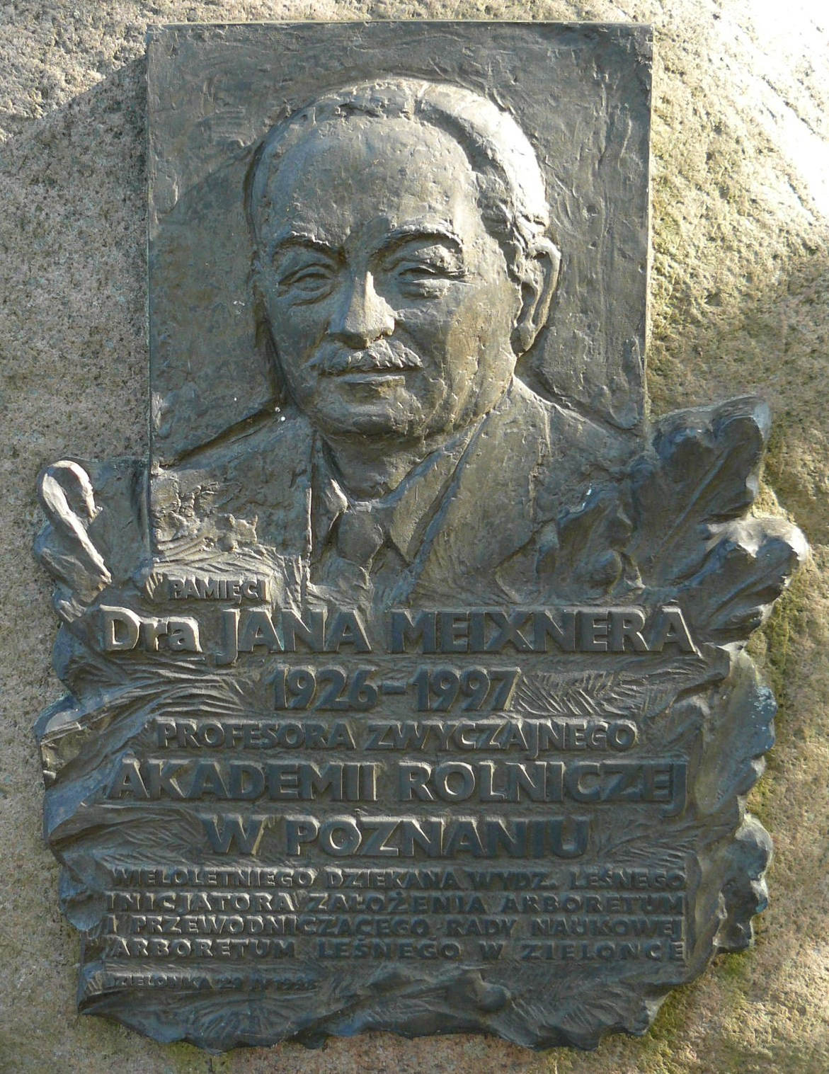 Jan Meixner plaque. Arboretum, Zielonka, PL.